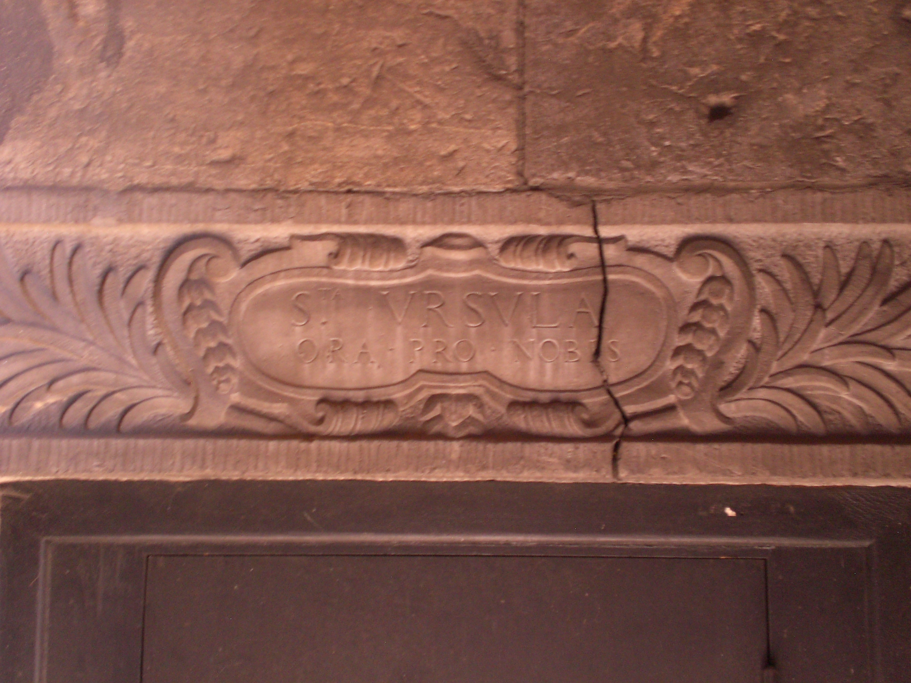 Sainte Ursule, chapelle du Palais de Liège, linteau